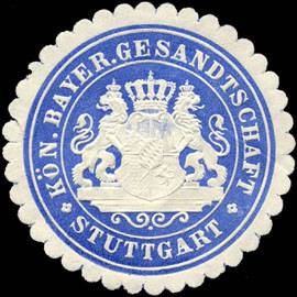 Sealing stamp Title: Königlich Bayerische Gesandtschaft - Stuttgart Description: blau, weiß, geprägt Place: Stuttgart size: 4 cm